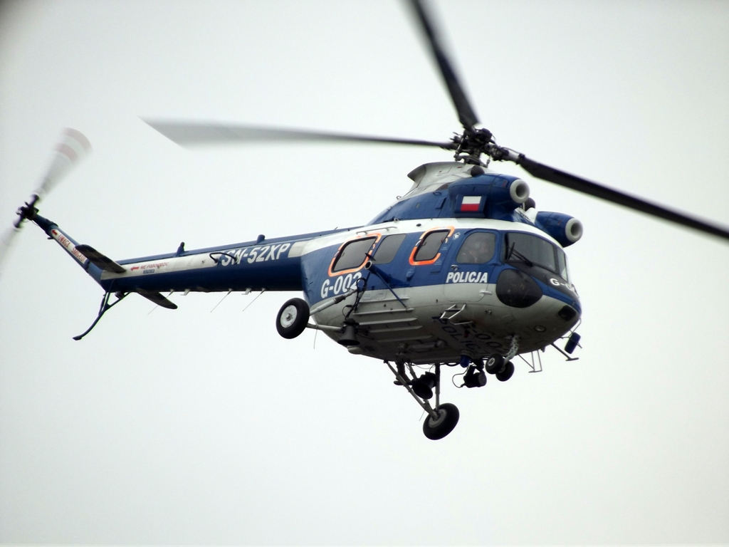 Zdjęcie zrobione podczas drugiego dnia VIII Małopolskiego Pikniku Lotniczego w Krakowie-Czyżynach.